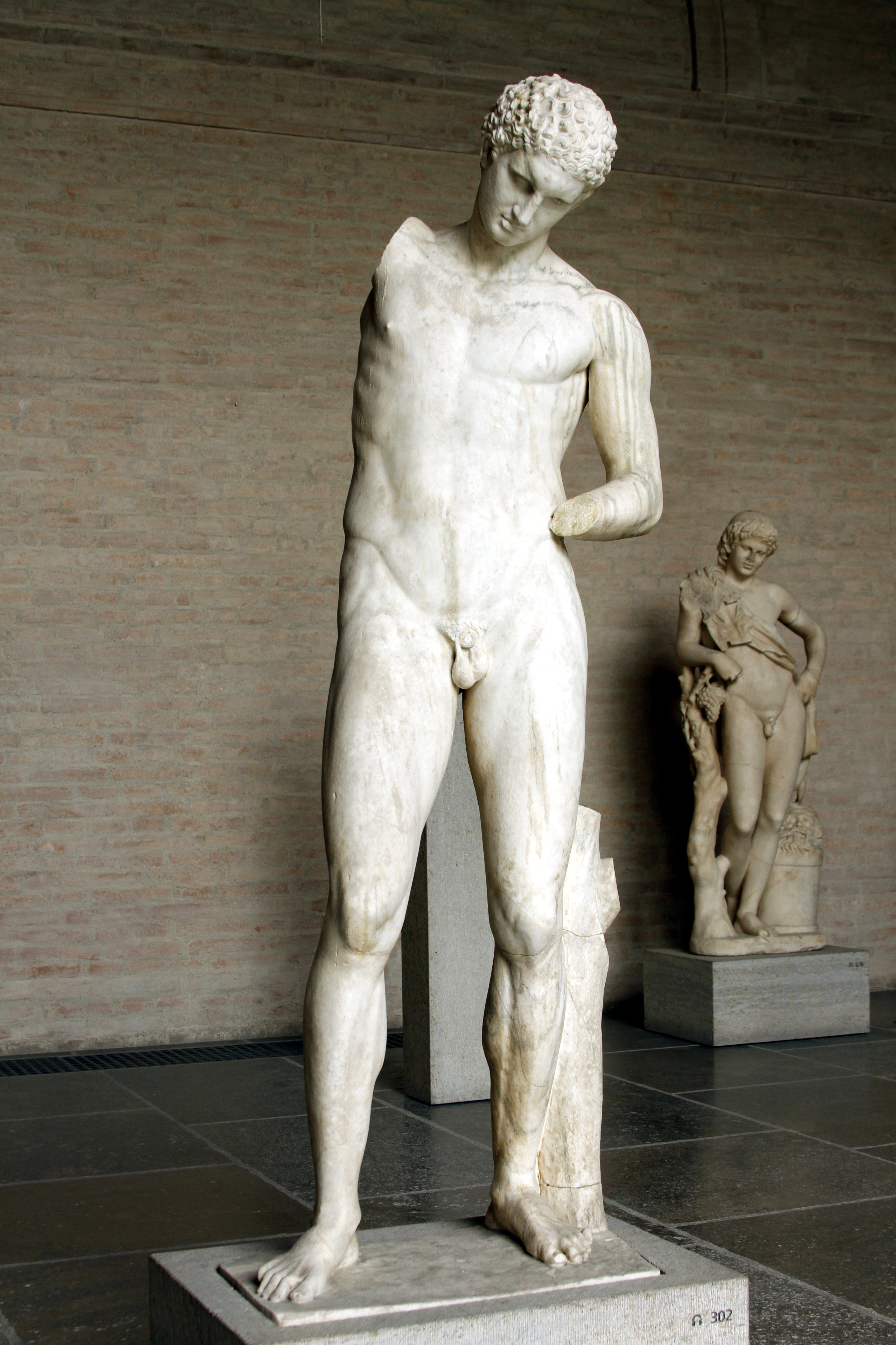 Glyptothek - Munich - Germany